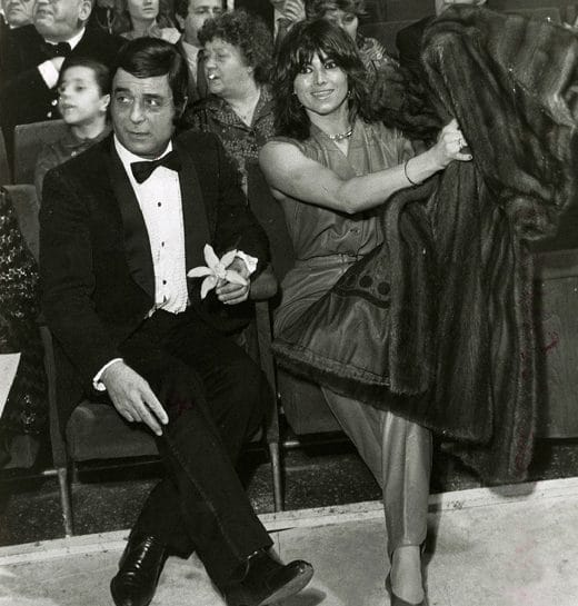 Marina Occhiena al Festival di Sanremo 1981